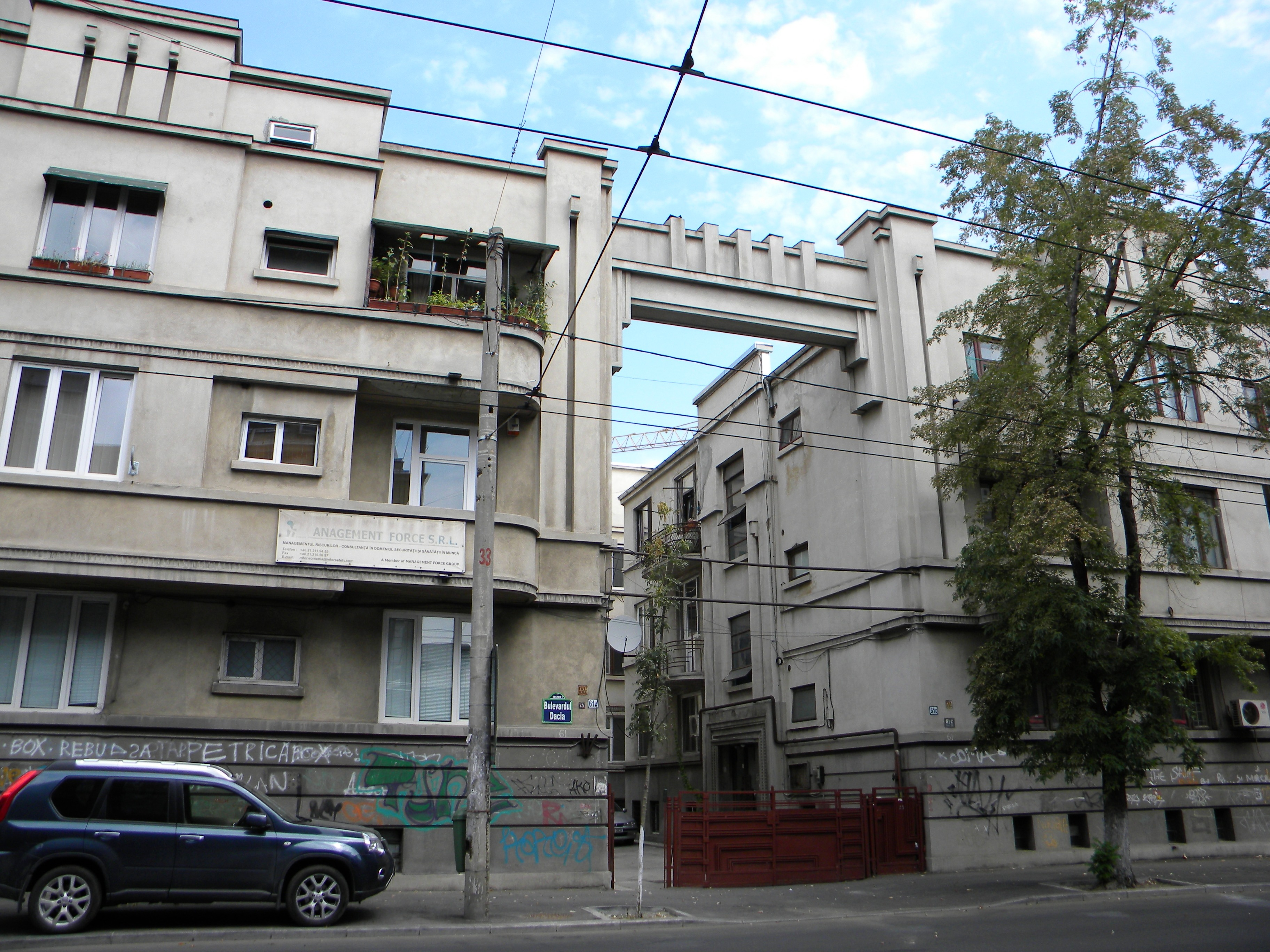 Imobil locuinte ing. E. Prager, Bd. Dacia, sect. 1